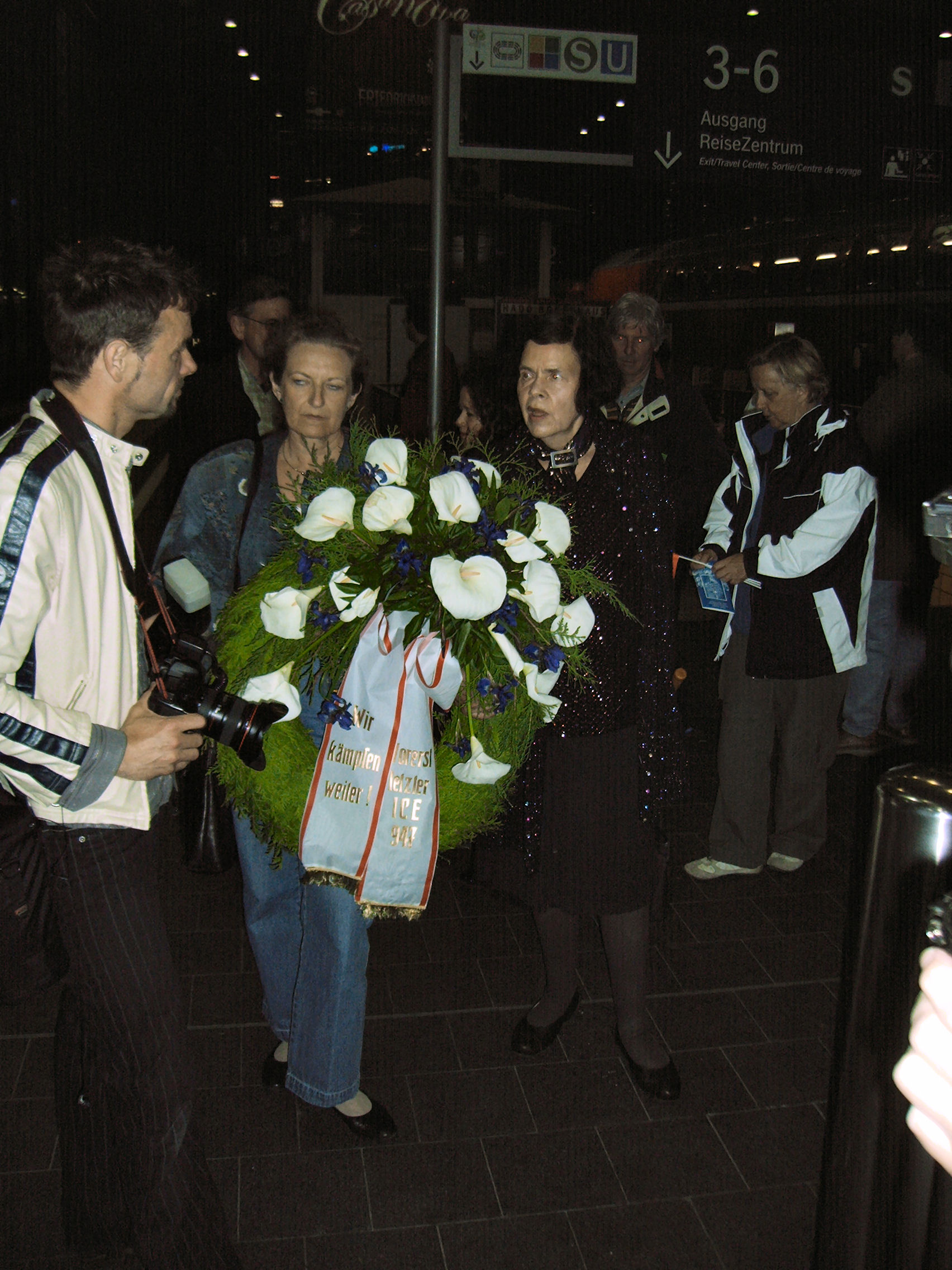 Kranzniederlegung in Gedenken an den ICE 947 am 28.05.2006 im Bahnhof Berlin Zoologischer Garten